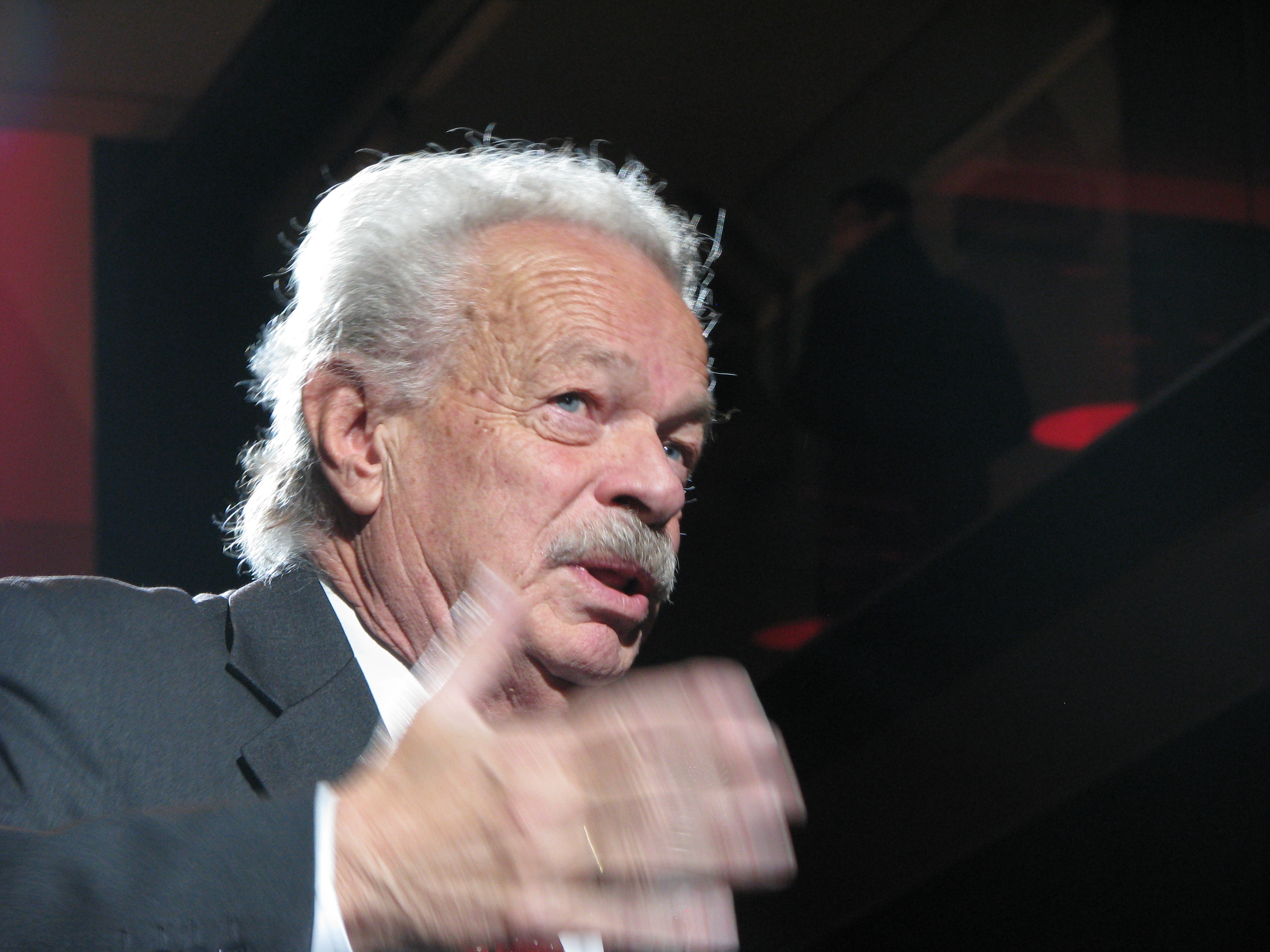 L'architetto Aurelio Galfetti alla premiazione del concorso Art Net Award.